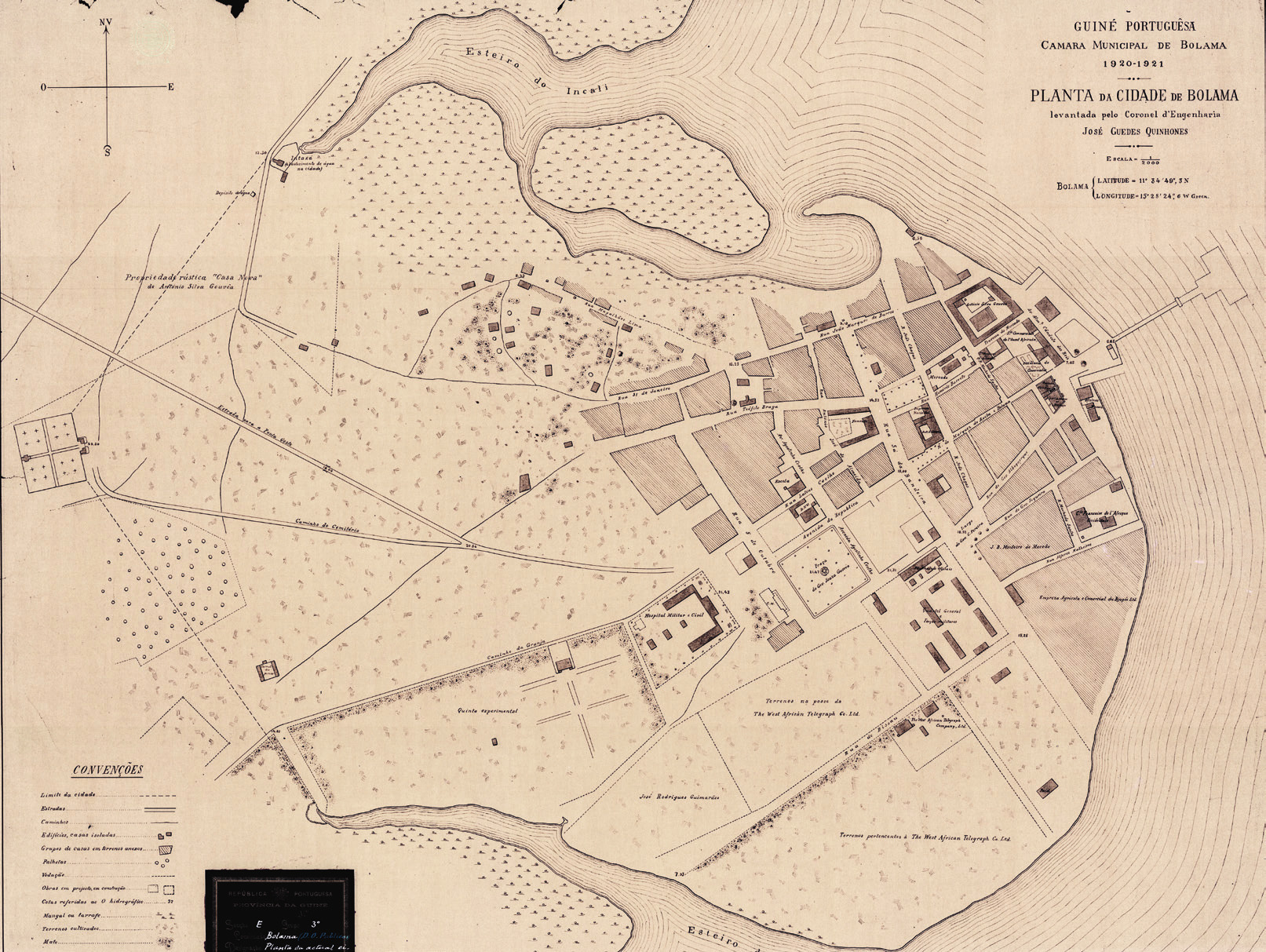 Planta de levantamento da Cidade de Bolama